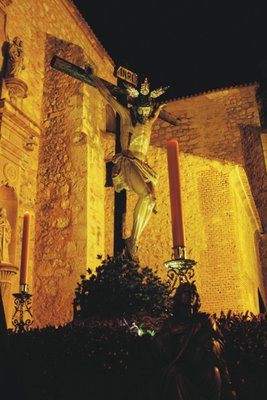 Cristo del Consuelo, de Daimiel (Ciudad Real. Stmo. Cristo del Consuelo a su salida de la Parroquia de San Pedro Apóstol.